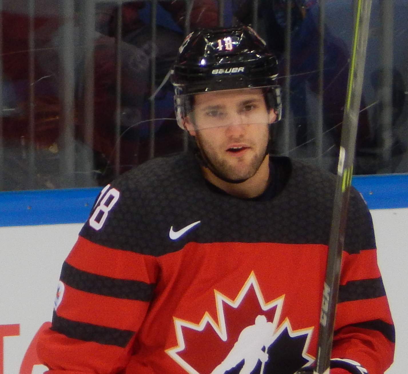 Кубок Первого Канала 2017, матч Чехия - Канада (15 декабря 2017) 18 VEY,Linden 12 ELLIOTT,Stefan